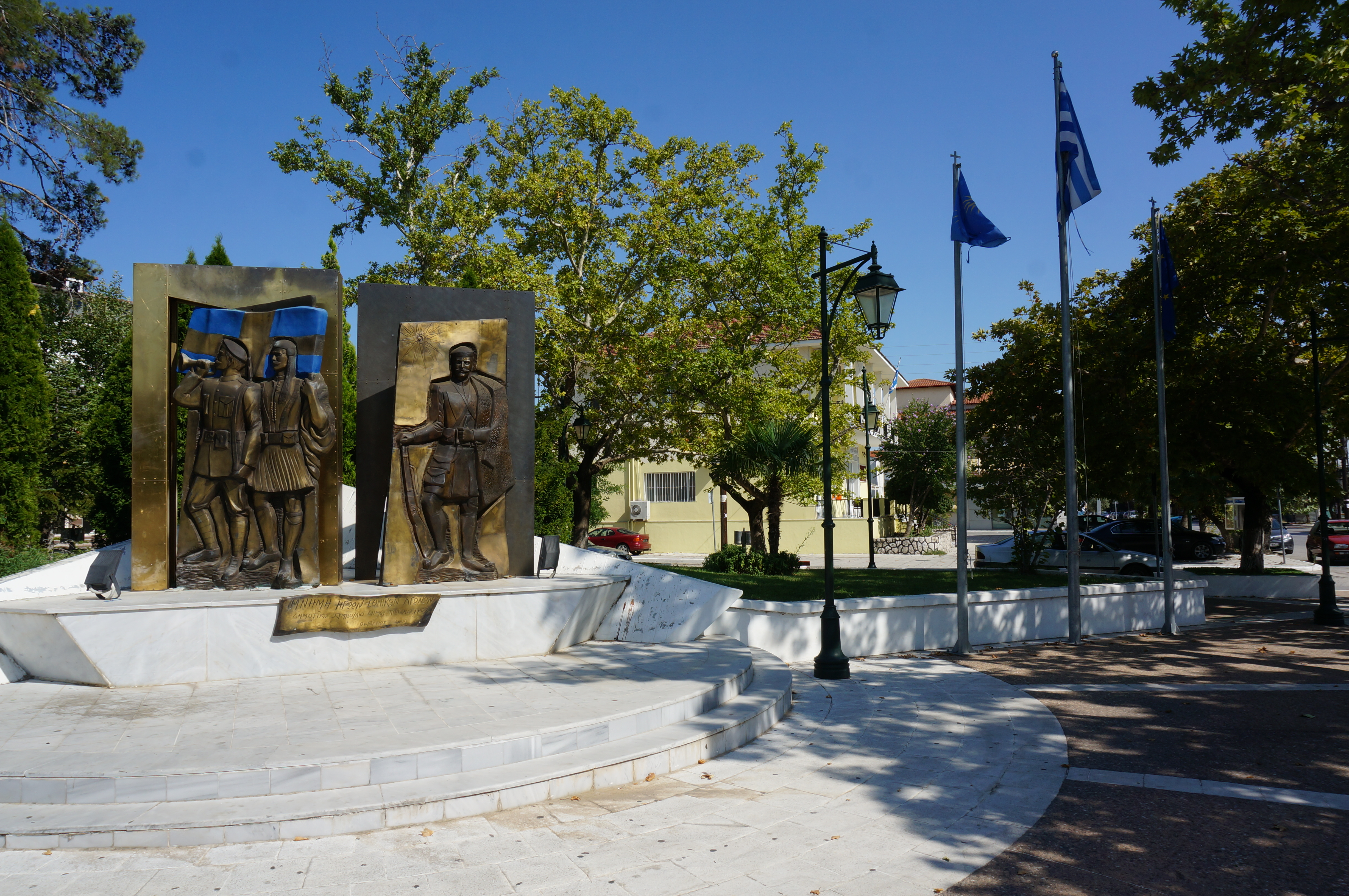 Tombe de la nécropole d'Europos.